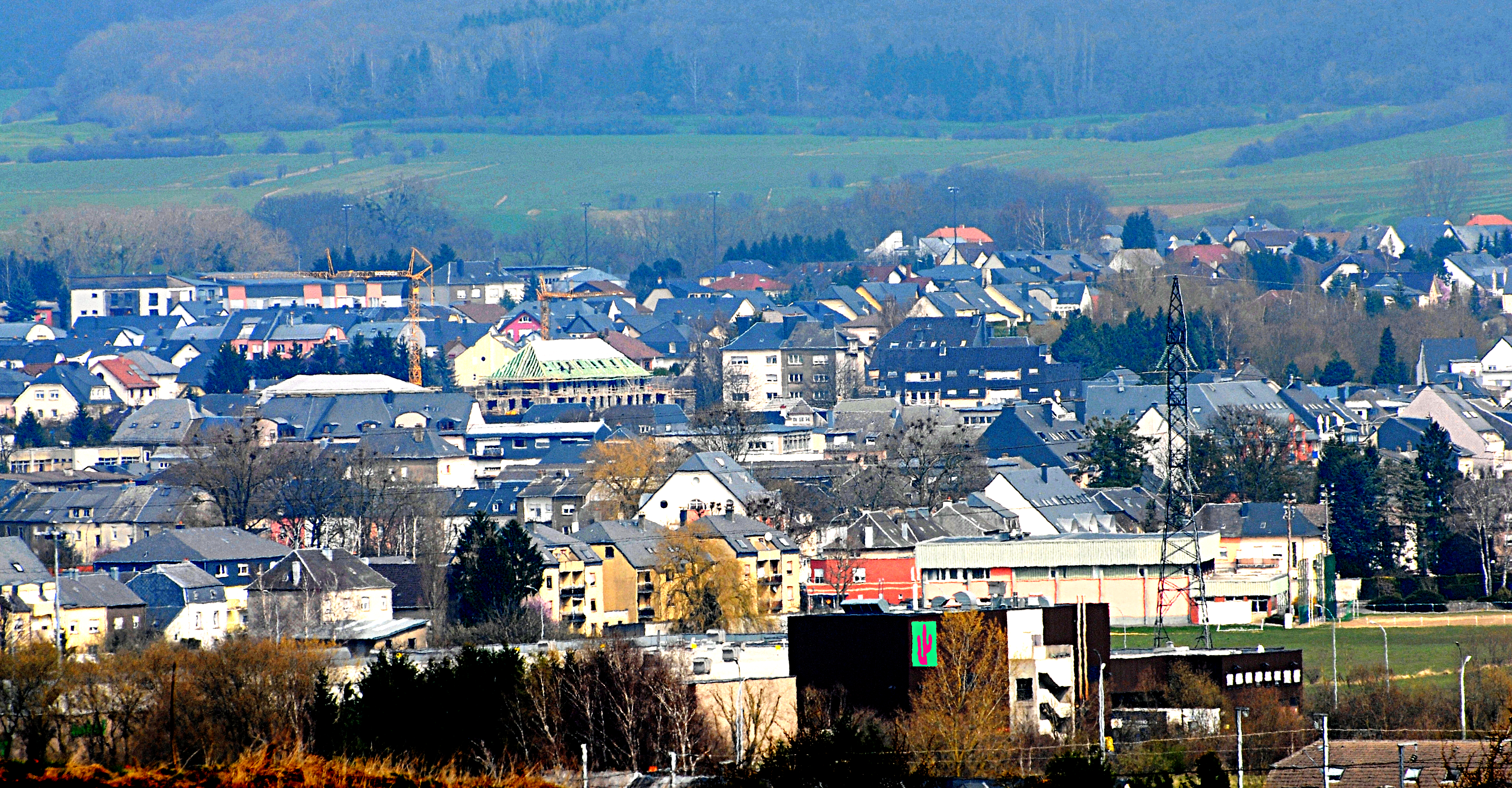 Bascharage au Grand-Duché de Luxembourg